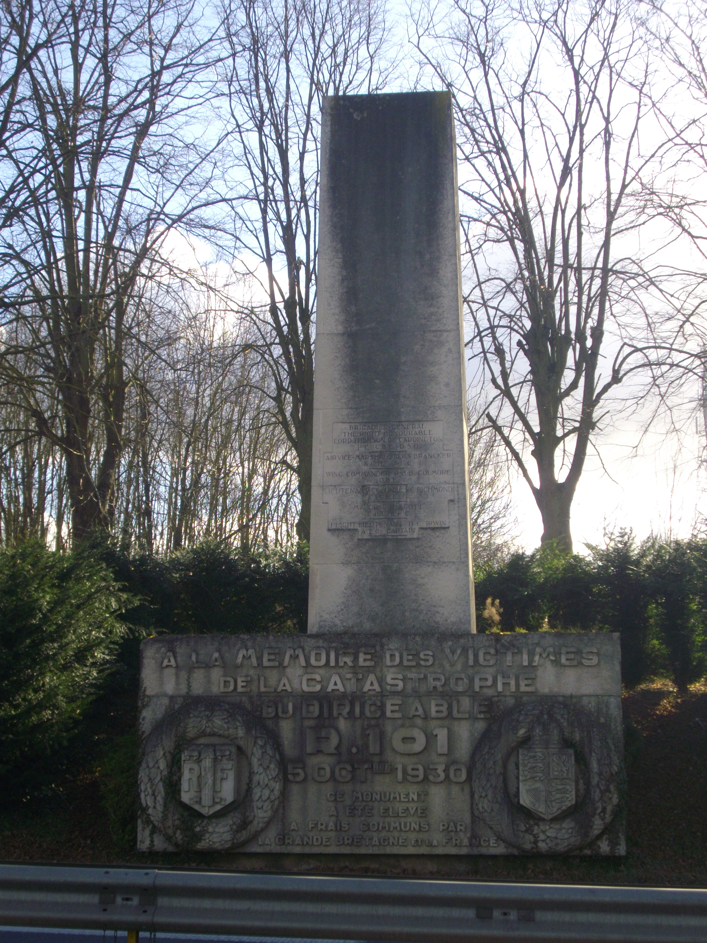 Mémorial de l'accident du R101, octobre 1930, à Allonne (Oise, France) Аҧсшәа: Memorial to october 1930 R101 crash, in Allonne (Oise, France)